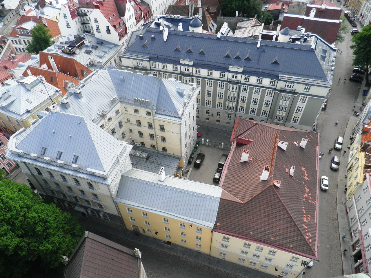 Pagari tänava hooned vaadatuna Oleviste kiriku tornist.